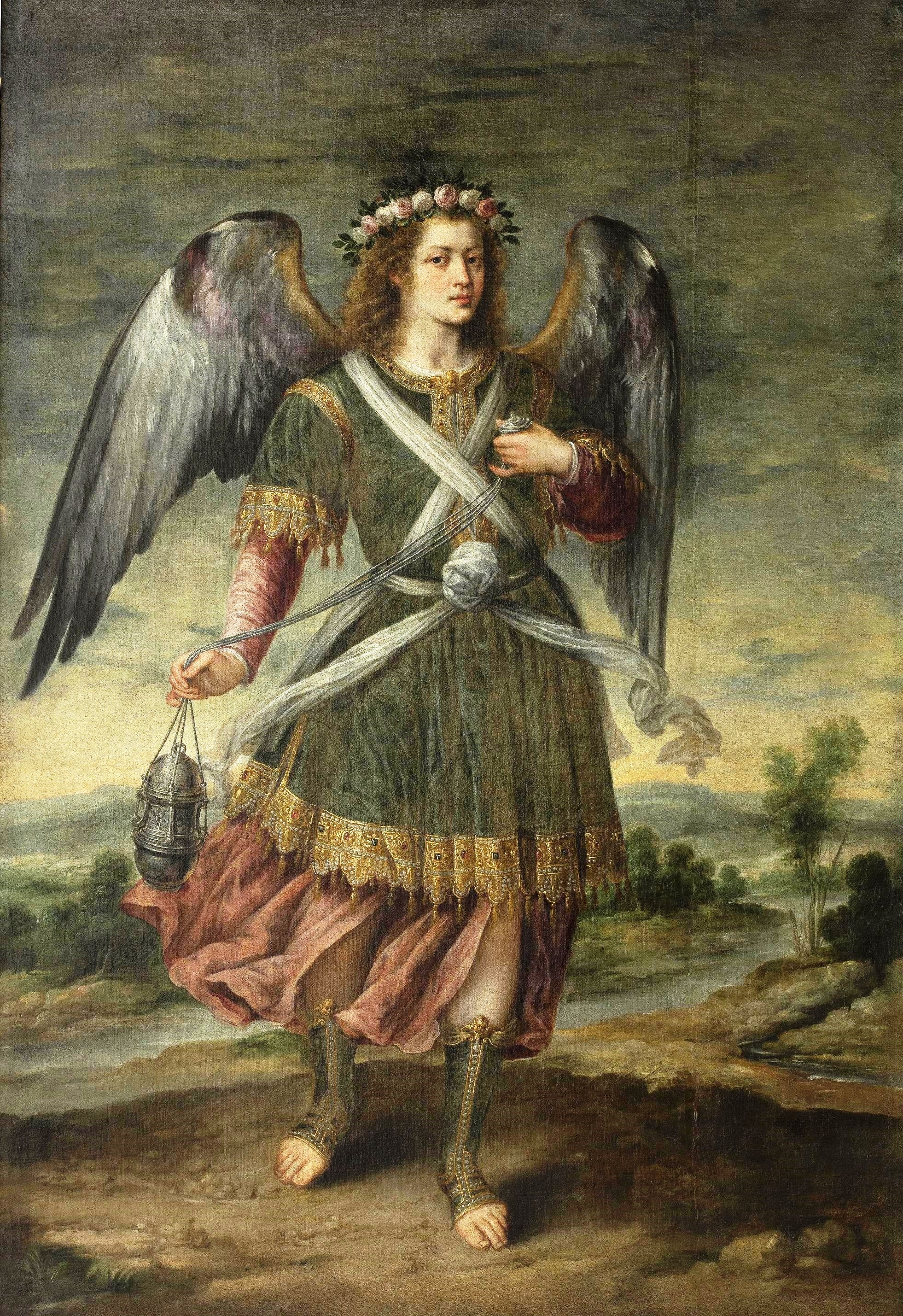 La obra representa al Arcángel Seatiel llevando un incensario de plata en su mano derecha.